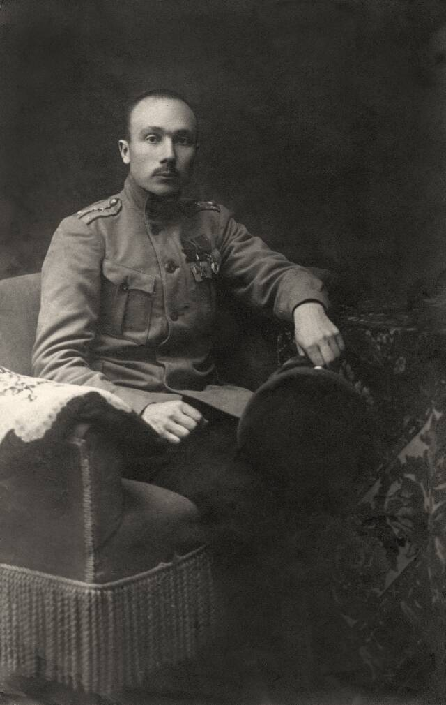 Staabikapten Anton Irv.